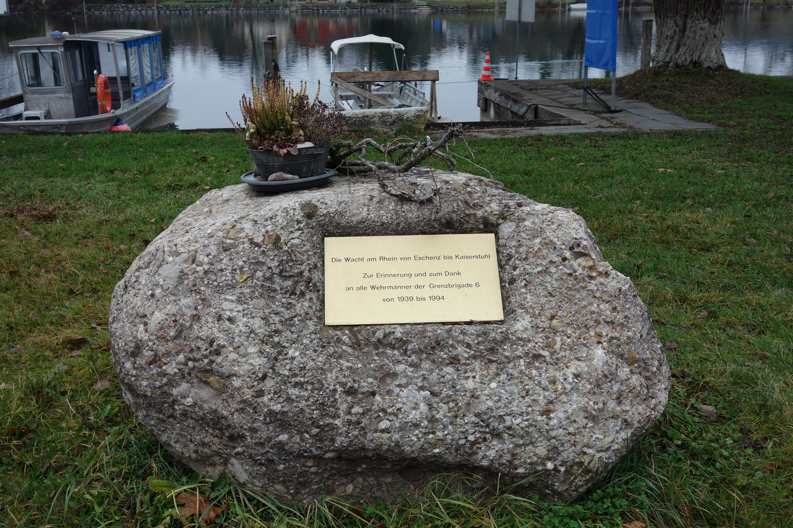 Denkmal Grenzbrigade 6 Wacht am Rhein, Gasthaus Alt-Paradis TG, Schweiz